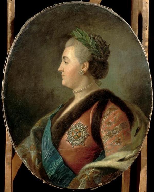 Кацярына II